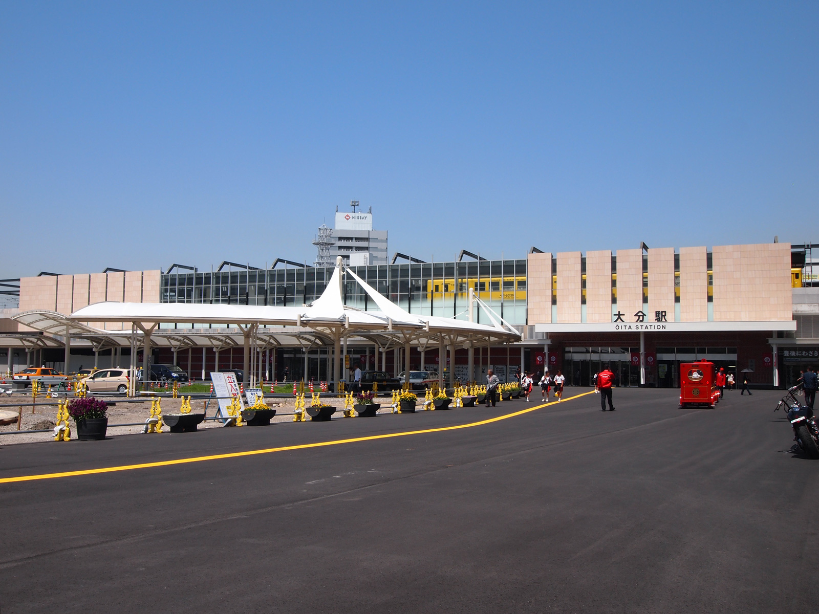 JR大分駅上野の森口（大分県大分市）